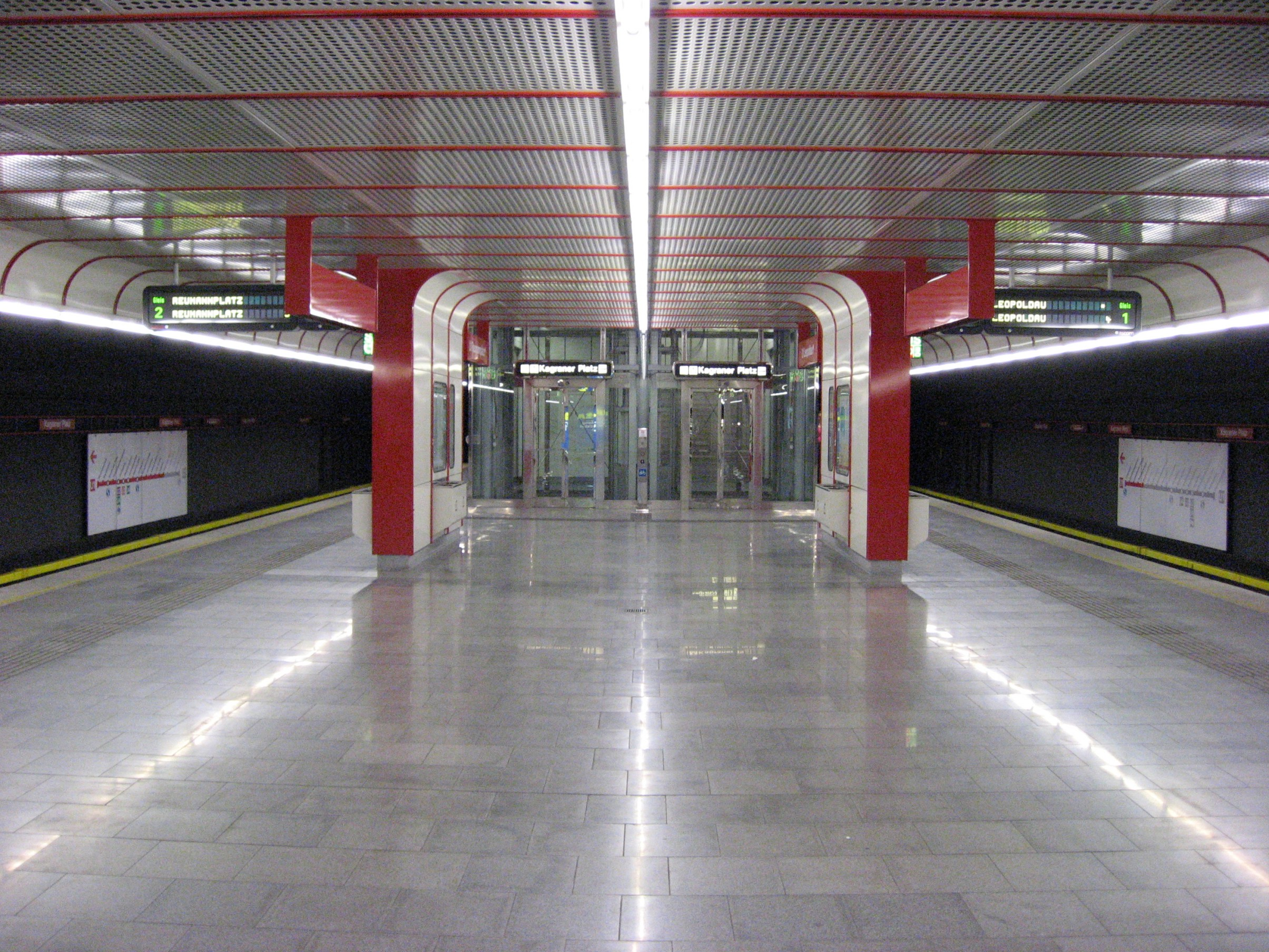 Wien U-Bahn-Station Kagraner Platz Bahnsteig